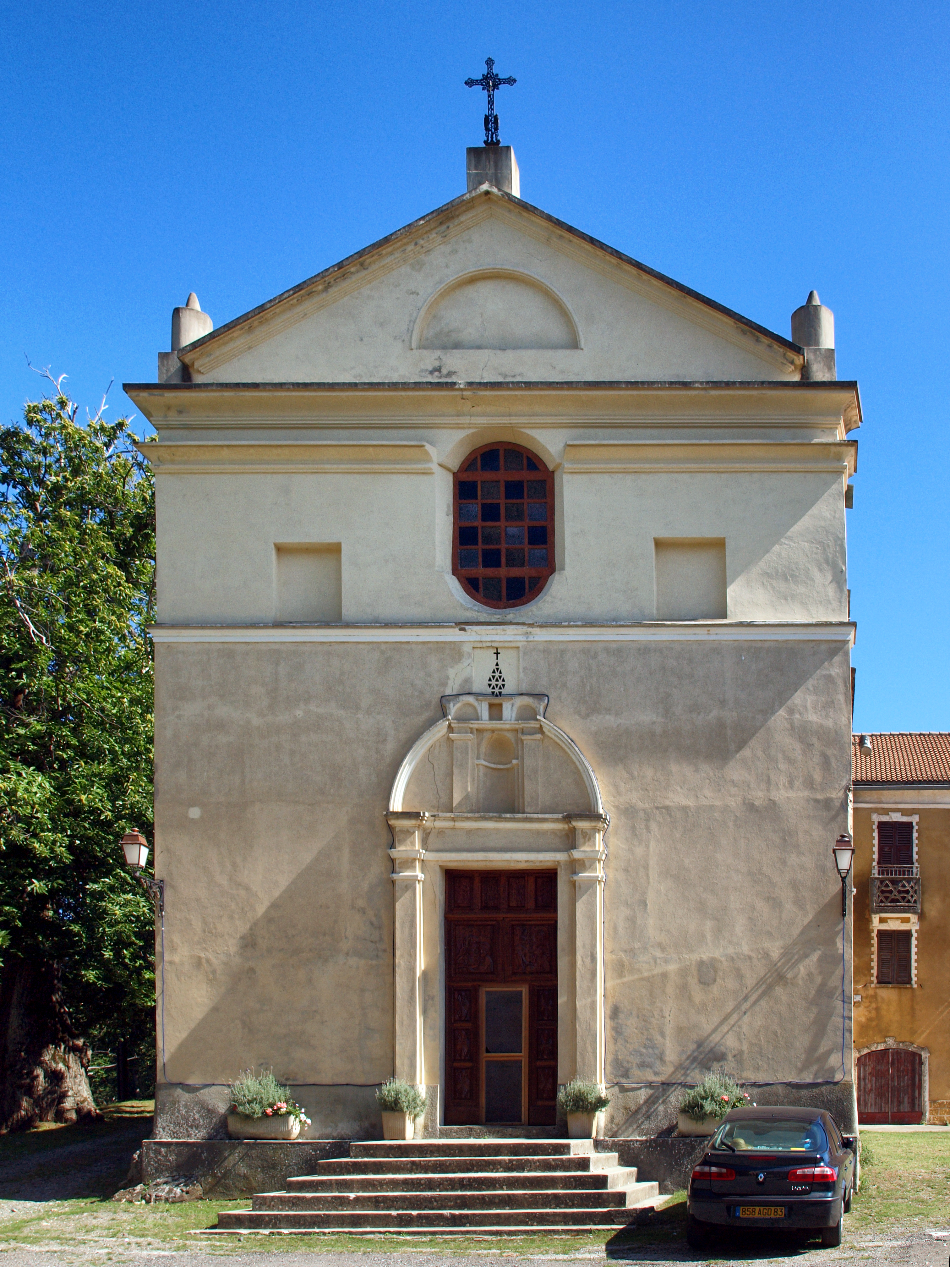 Croce, Castagniccia (Corse) - Façade principale de l'église Saint-Césaire de Croce